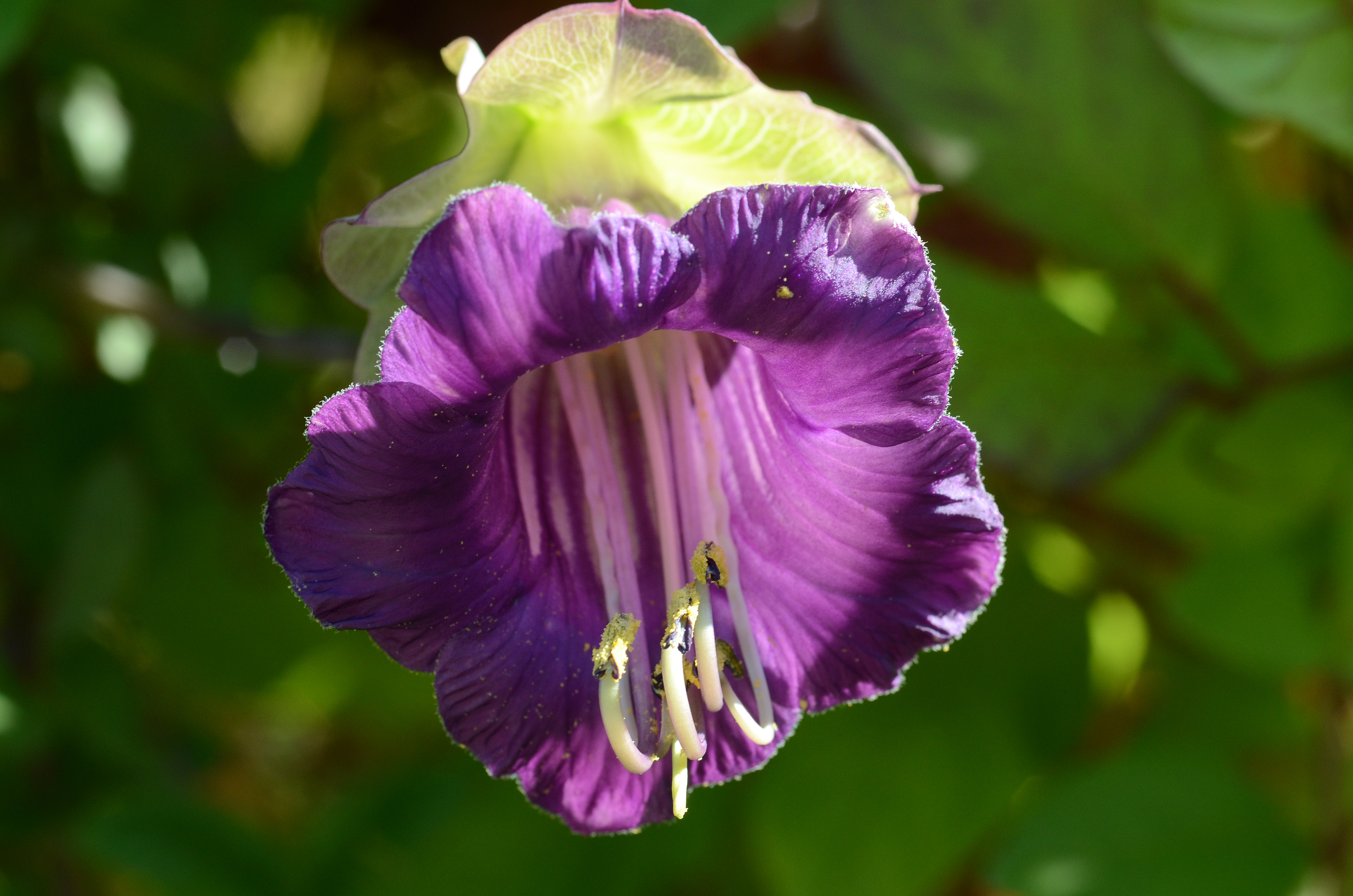 Cobaea scandens, Glockenrebe